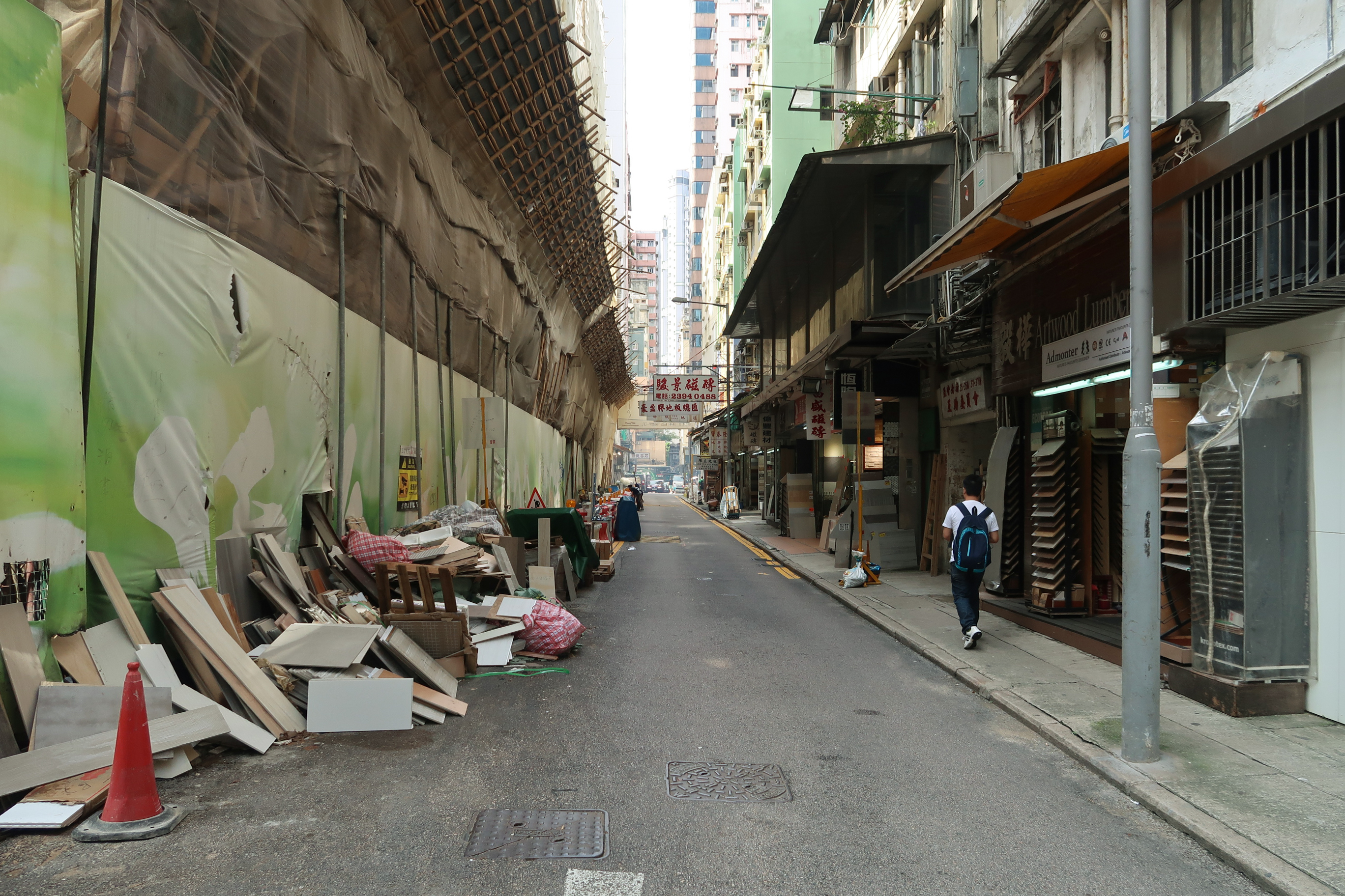 Hong Lok Street